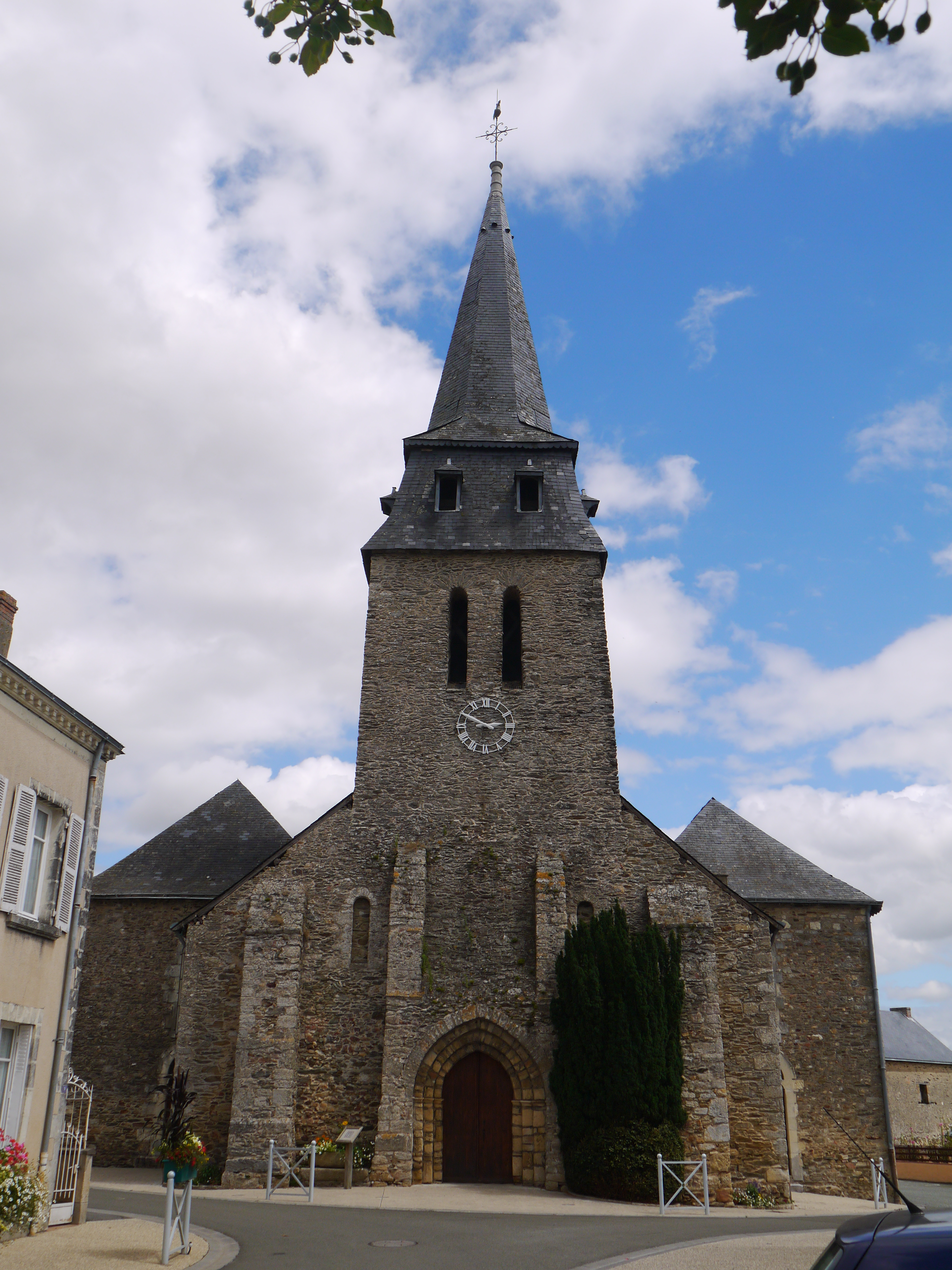 Bierné église Saint-Pierre